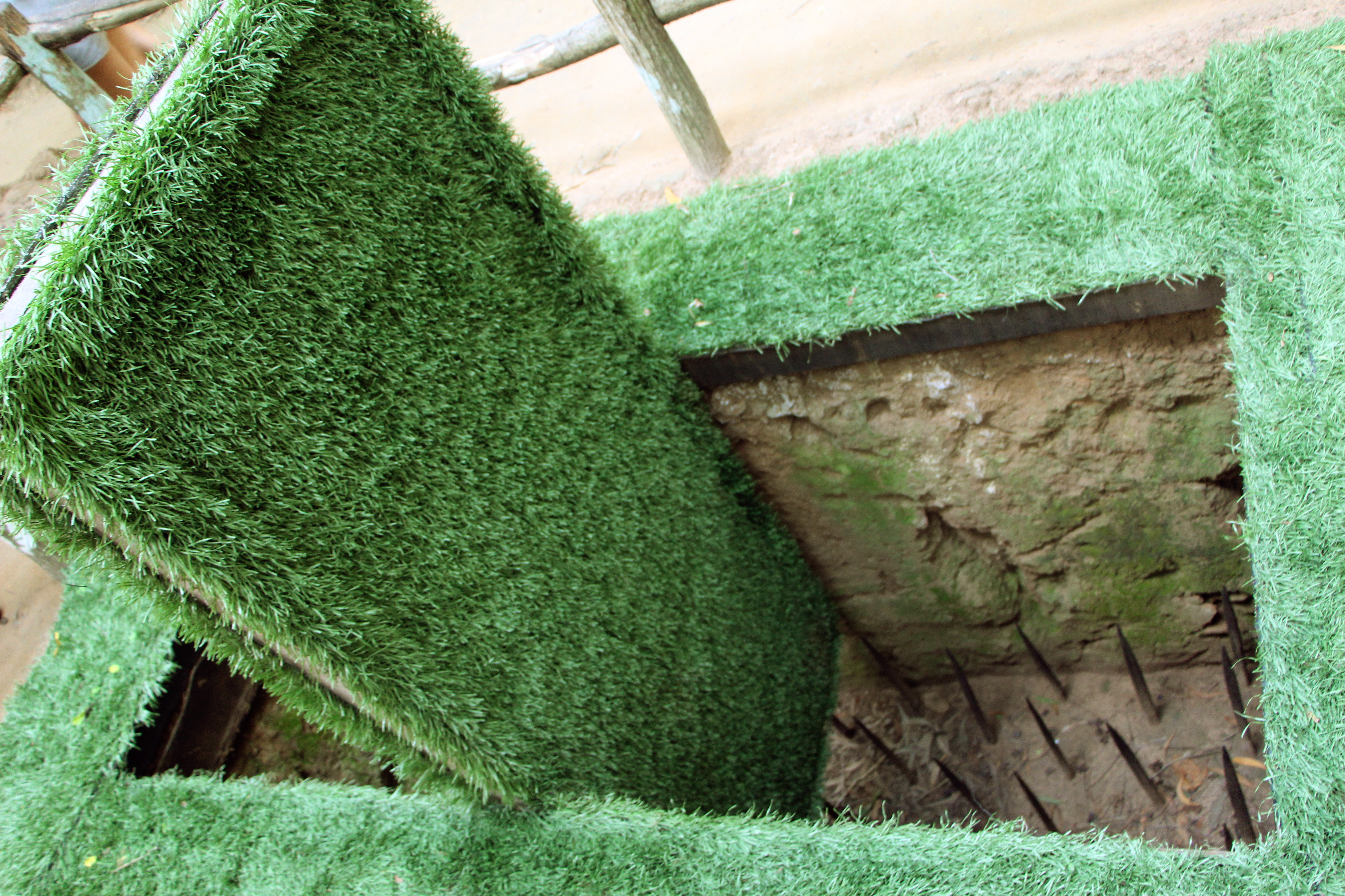 古芝地道中其中一個地道入口